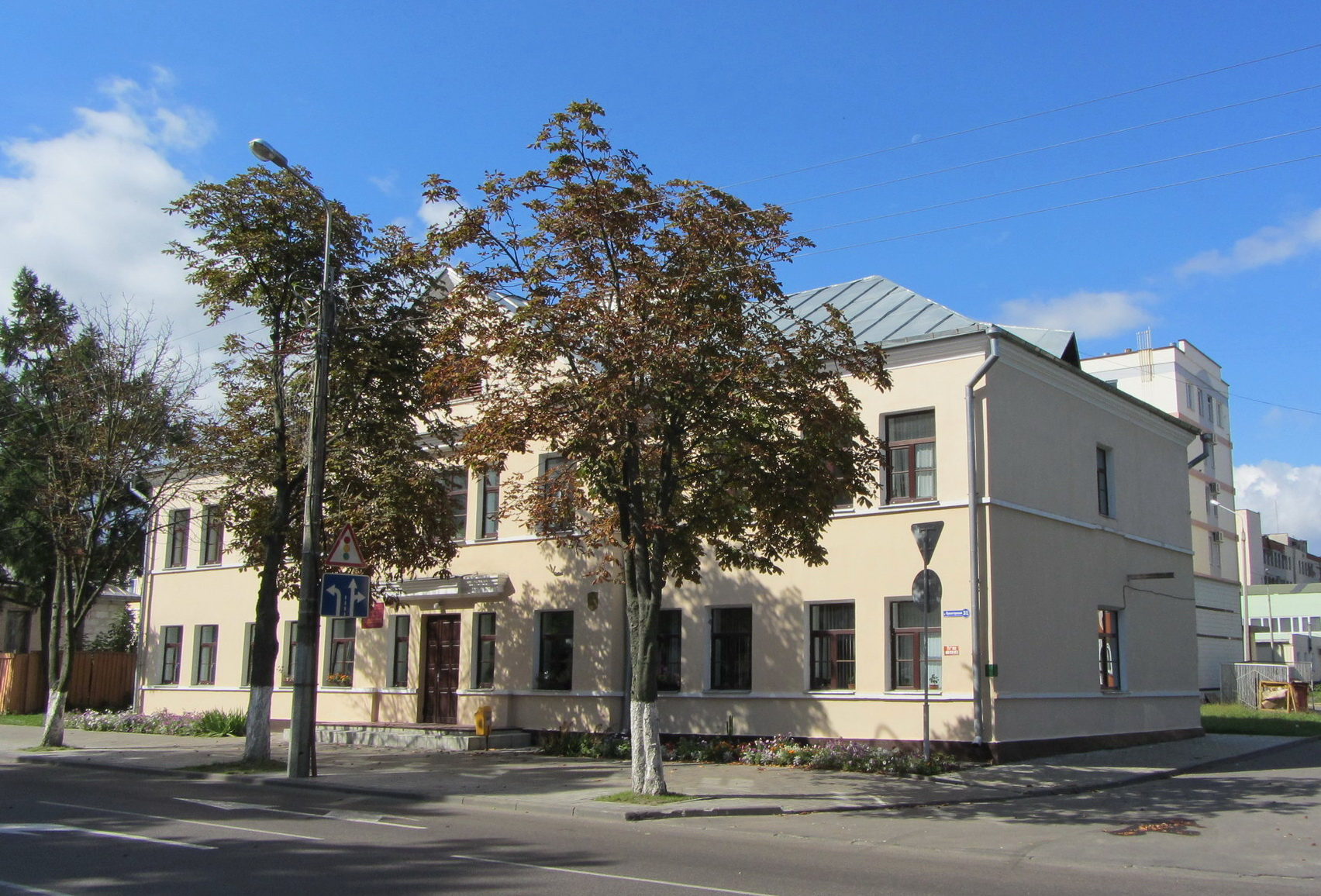 Беларуская (тарашкевіца): Забудова вул. Пралетарскай. г. Гомель This is a photo of Belarusian heritage monument. Reference number: 313Г000056 ( WLM)